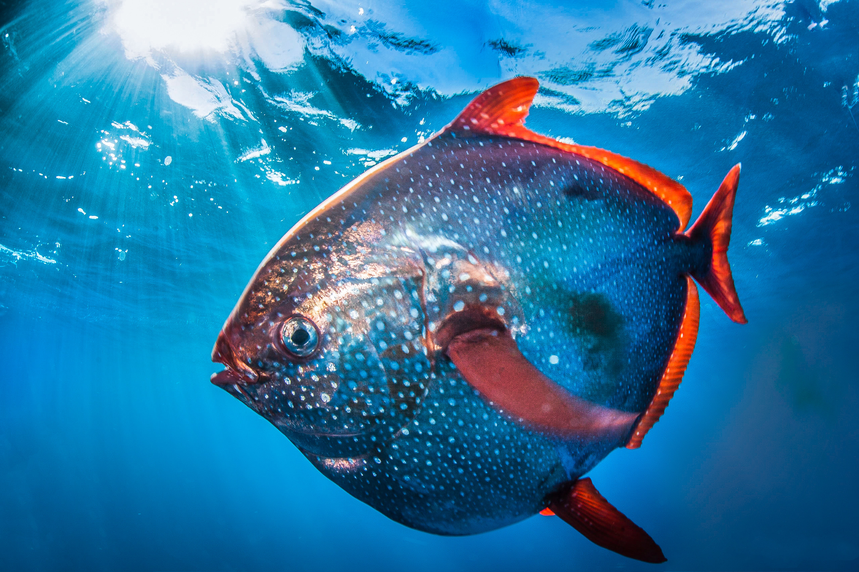 Lampris guttatus